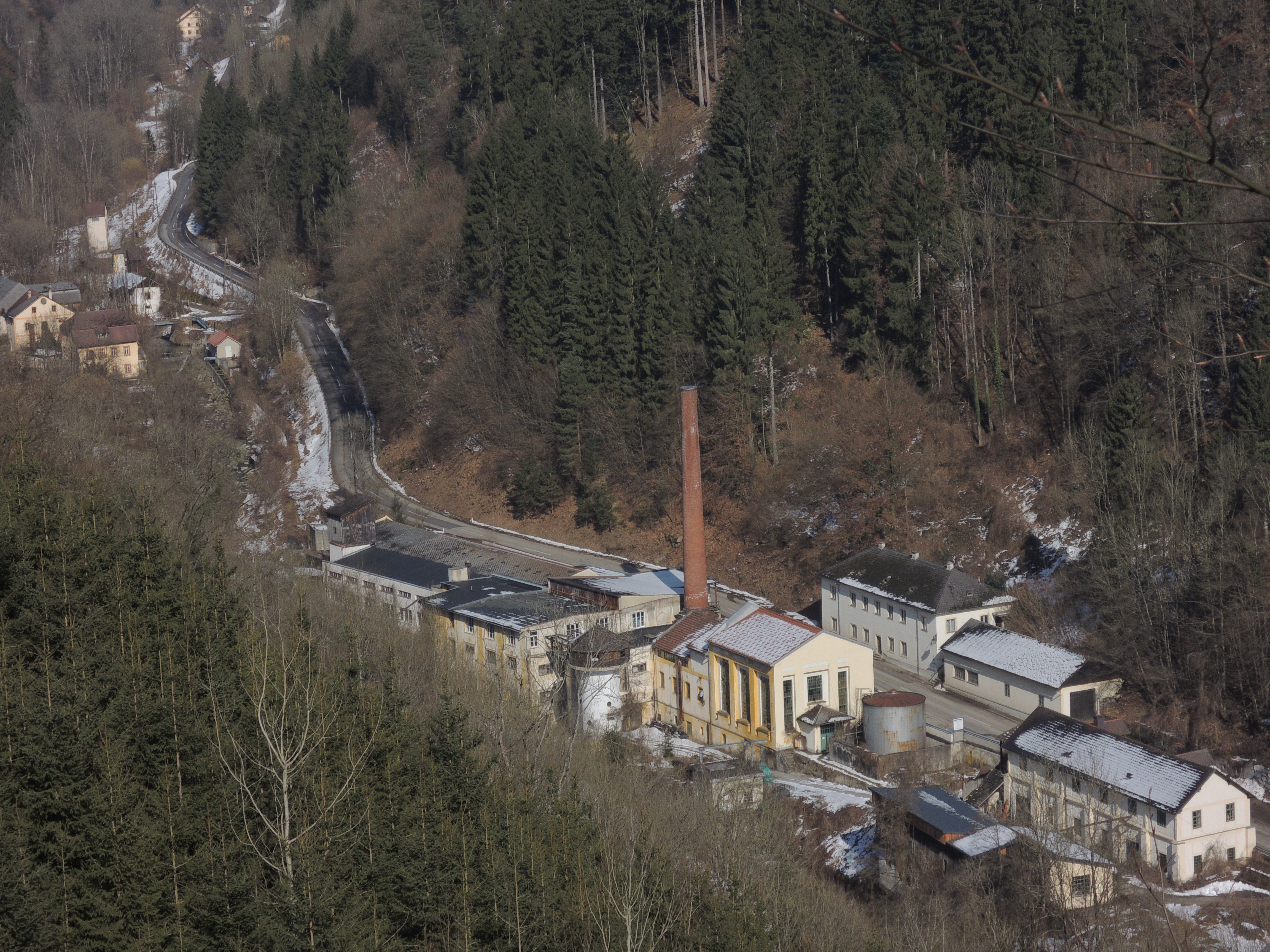 Eine Gesamtansicht des Geländes.